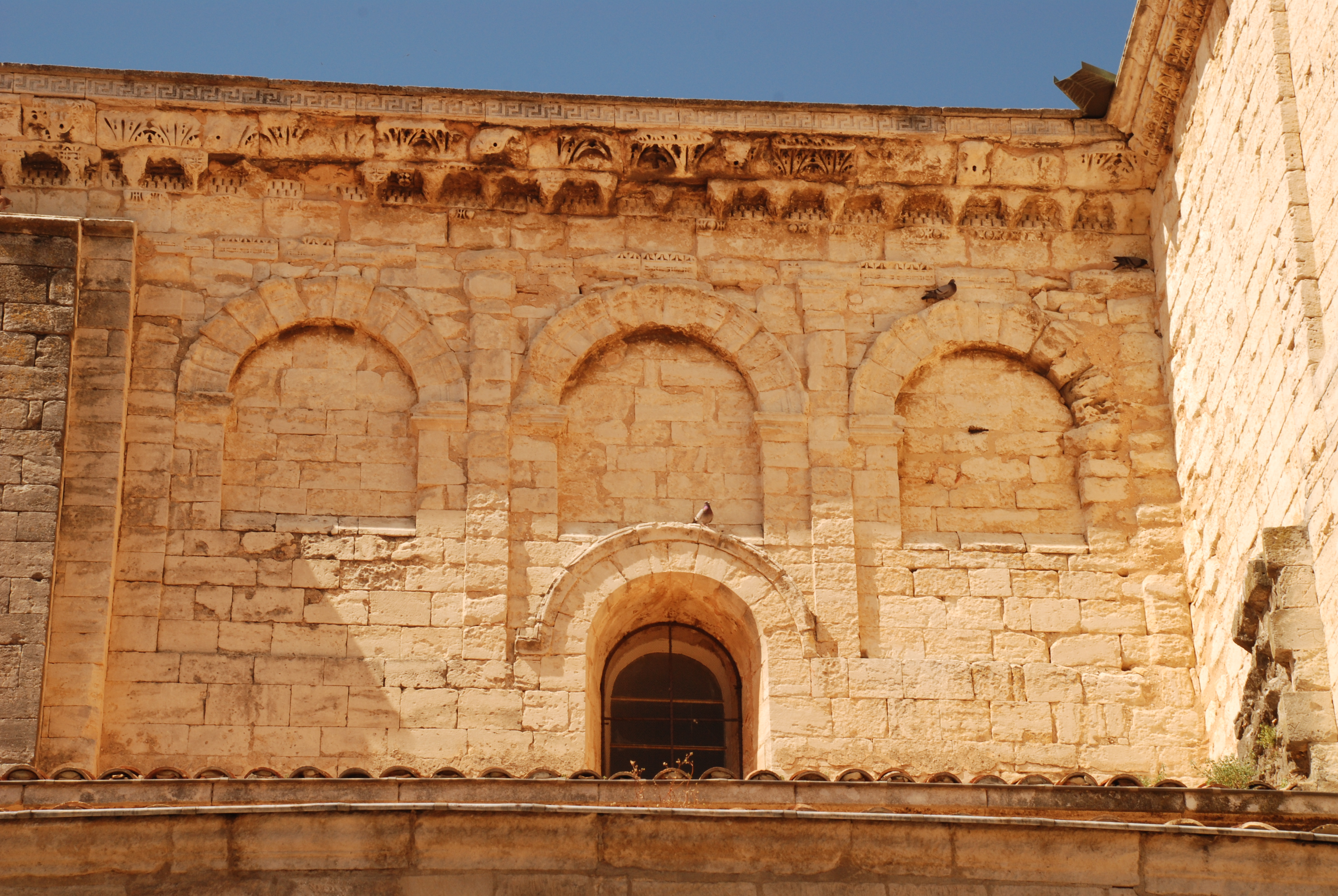 Cathédrale Notre-Dame de Saint-Paul-Trois-Châteaux